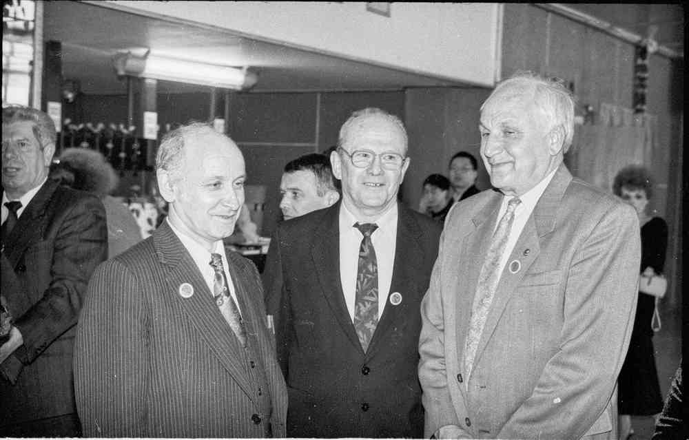 Михаил Геннадьевич Дмитриев (профессор, ректор УГП), Анатолий Михайлович Цирлин (профессор, преподаватель УГП), Владимир Александрович Ильин (академик РАН). 5-летний юбилей Университета города Переславля. Фойе культурного центра «Славич» в Переславле.